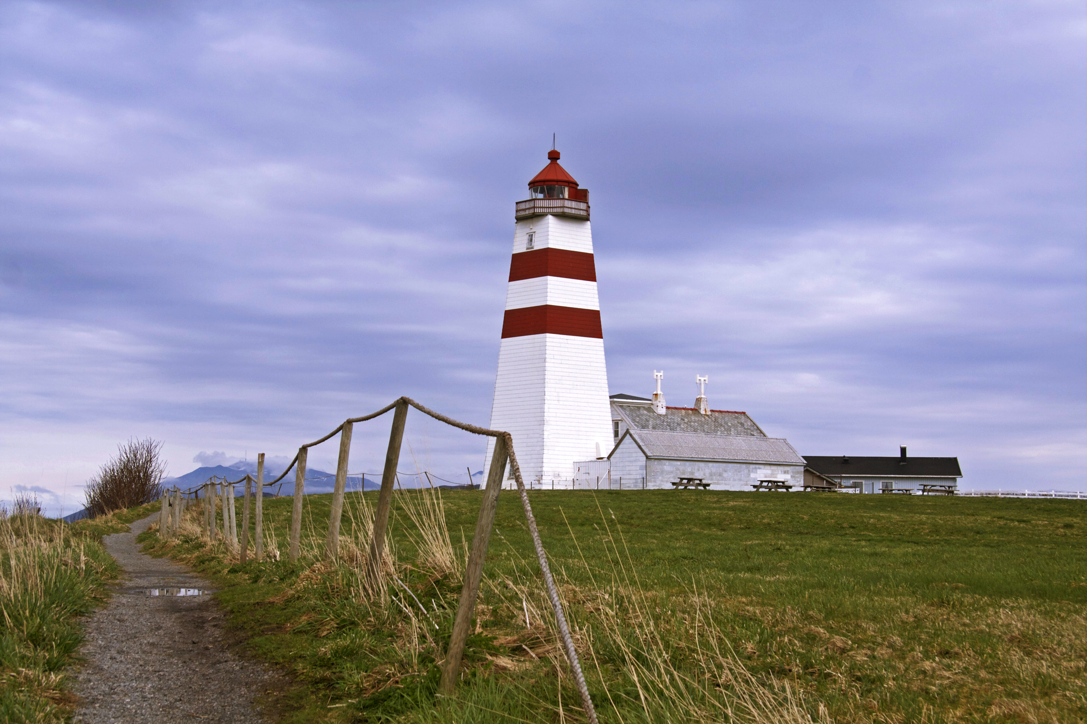 Alnes Fyrstasjon (Alnes Fyr) vart bygd i 1853 som eit kvadratisk fyrtårn. Det 22 meter høge tårnet var bemanna fram til 1983, og sidan 1993 har fyrstasjonen blitt nytta som cafe, til kunstutstillingar og utstillingsstad for fyrhistorier.